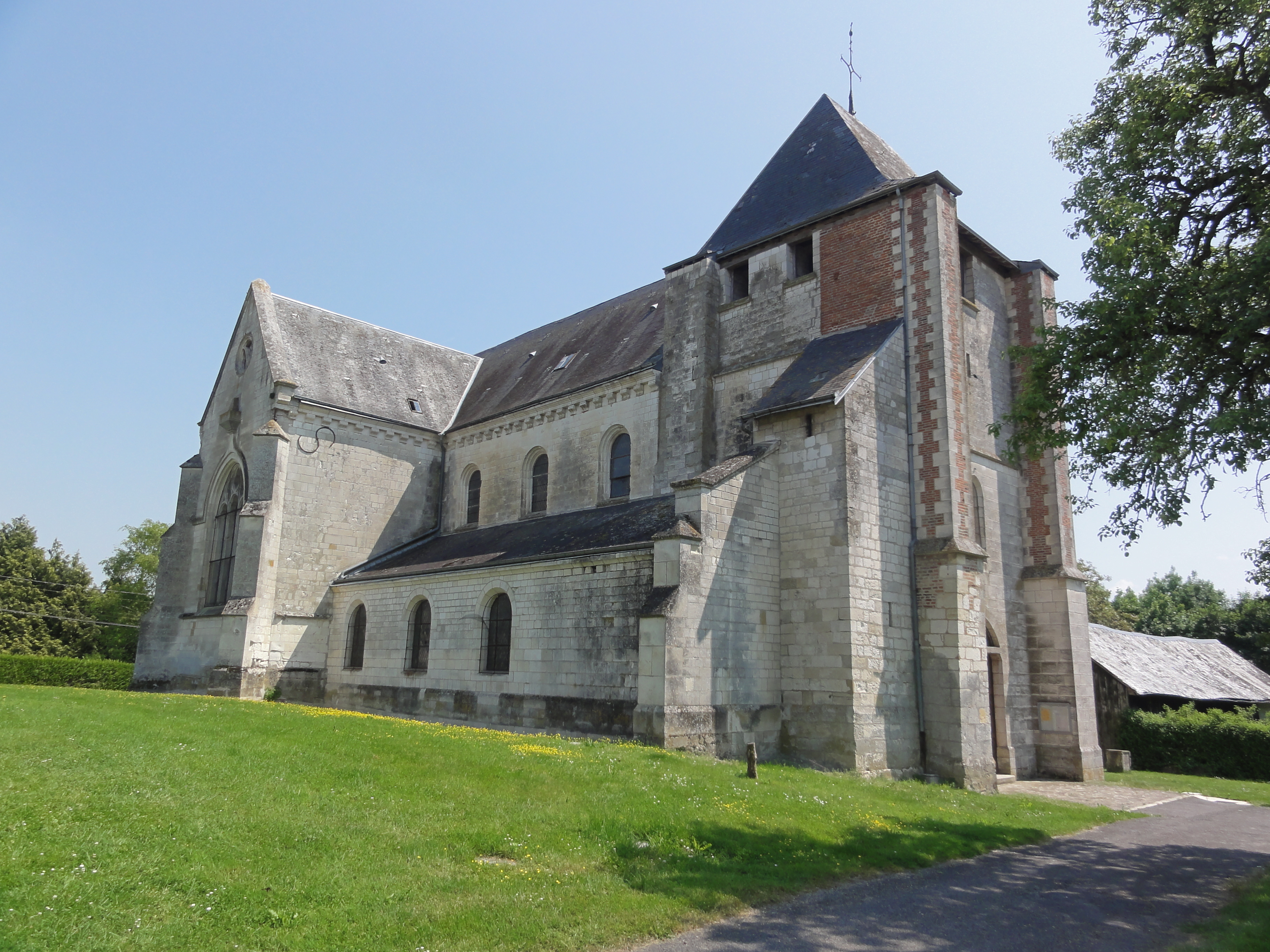 Saint-Fergeux (Ardennes, France) : église Notre Dame - Saint-Ferréol .